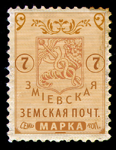 Почтовая марка с основным рисунком герба Харьковской губернии XVIII века (две змеи) Змиевского земства Харьковской губернии. Имитация; современная реконструкция.